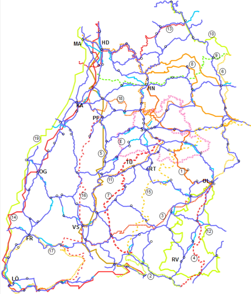 Netz und Routen BW